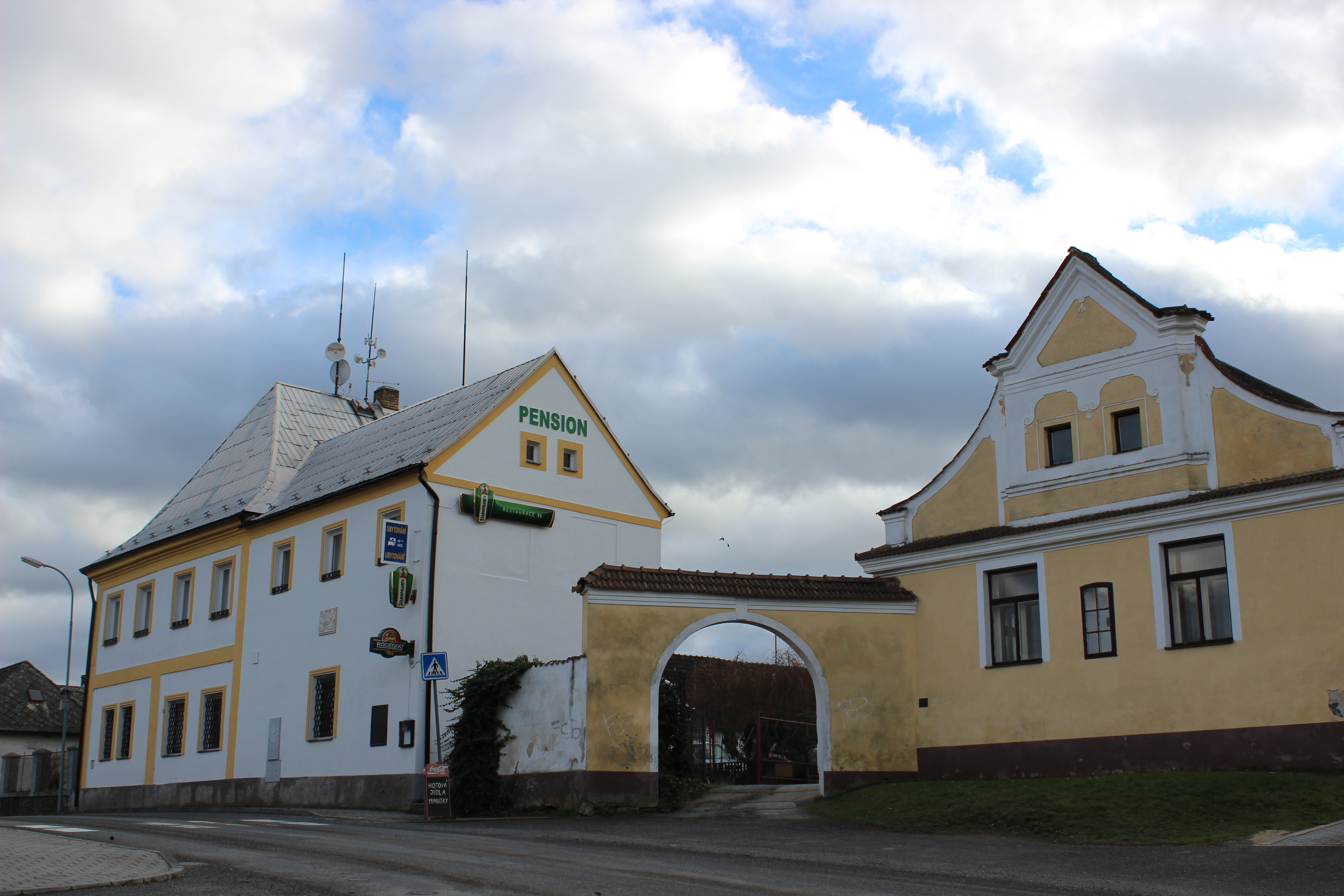 Hostinec, penzion. Košice (okres Tábor). Česká republika.